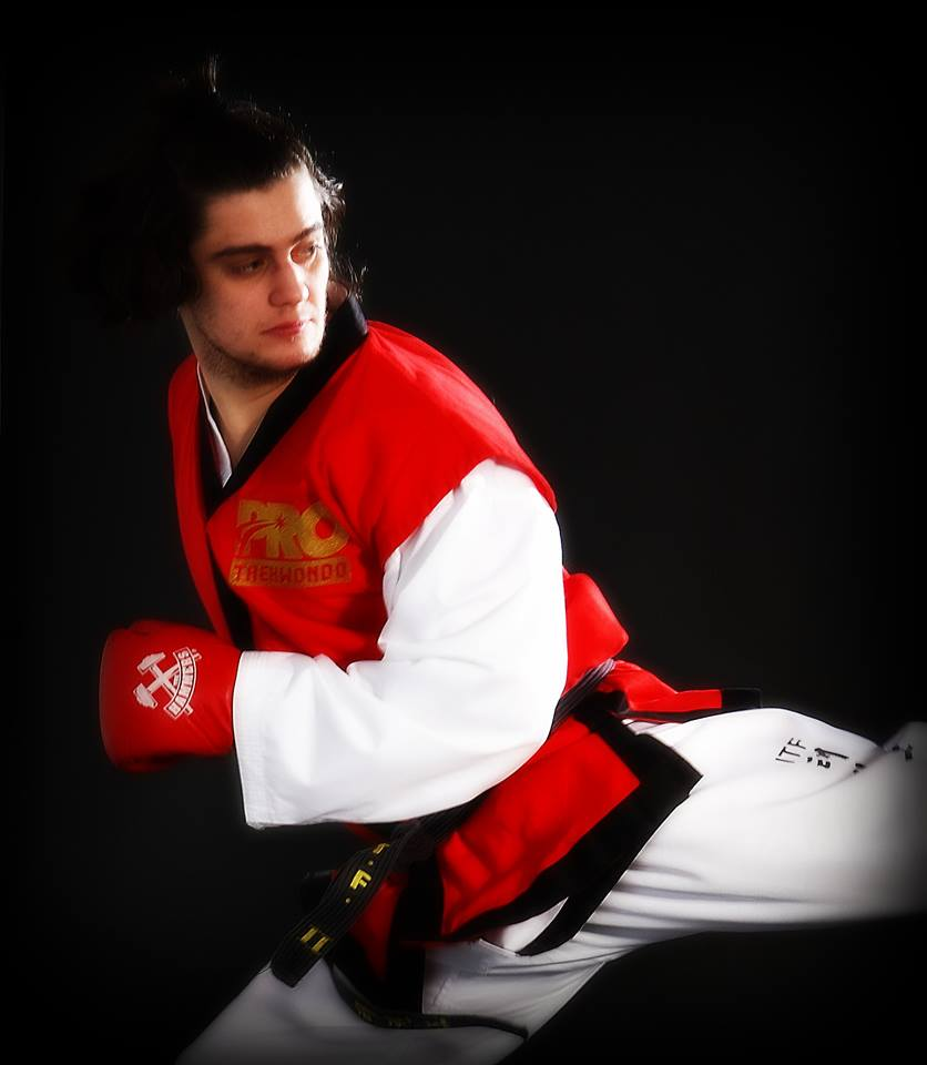 Антони Давидов, европейски шампион таекуон-до